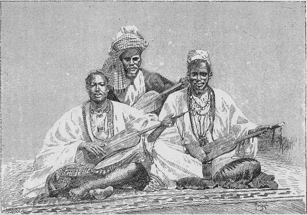 Griots de Sambala, roi de Médine (illustration de Côte occidentale d'Afrique du Colonel Frey) - Fig.81 p.128 - [Cote : Réserve A 200 386]